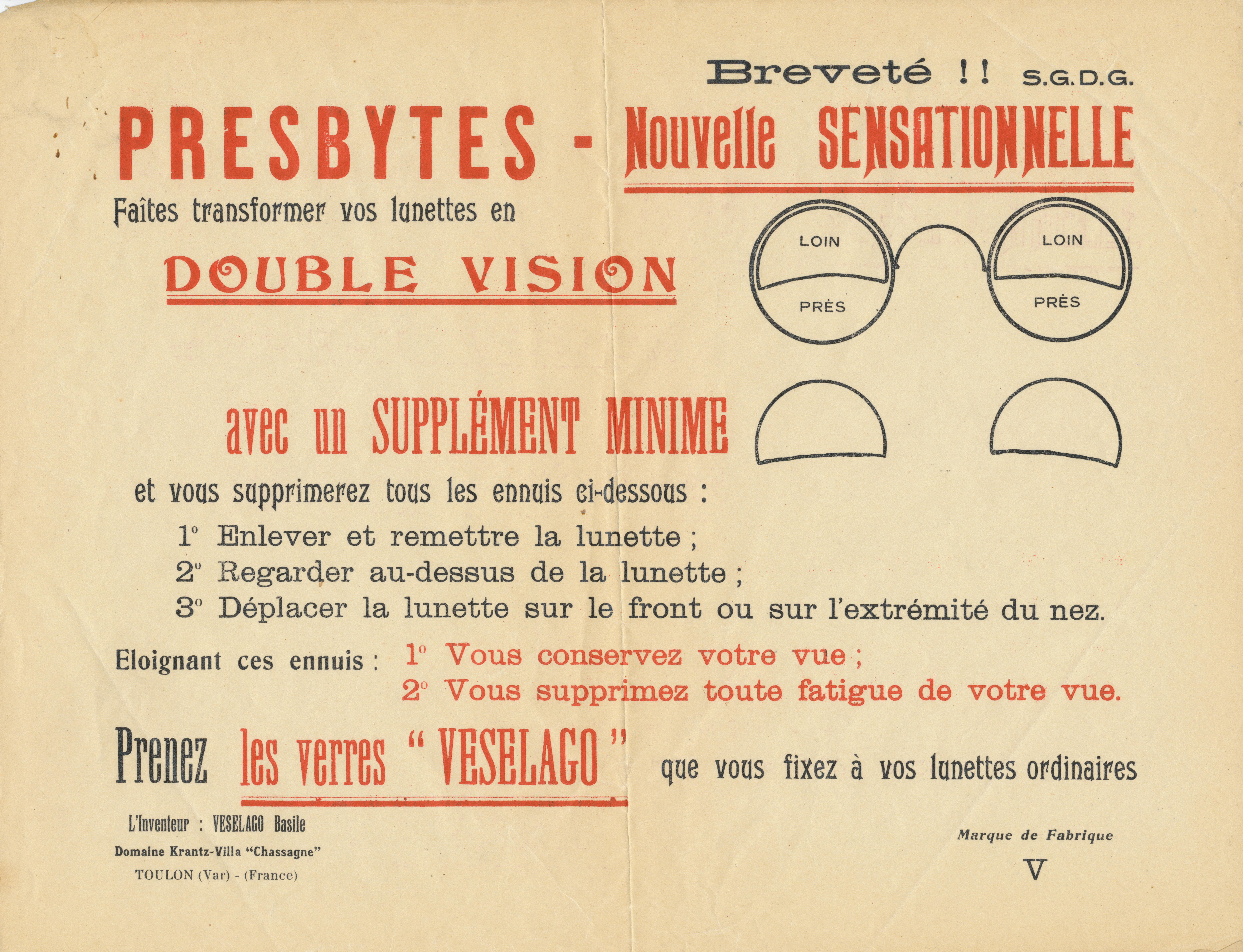 Бифокальные очки доктора Василия Веселаго (1882—...). Веселаго Василий Сергеевич окончил фельдшерскую школу в Кронштадте, служил на флоте в Севастополе и в Мариупольском уезде (станция Волноваха) в чине губернского секретаря. Эмигрировал в 1919 году. Как врач участвовал во французском Сопротивлении.